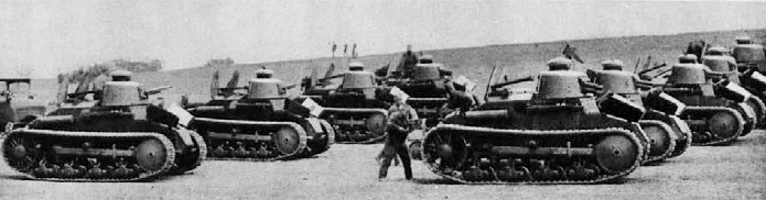 Vojna parada kraljeve jugoslovanske vojske v Beogradu - tanki.